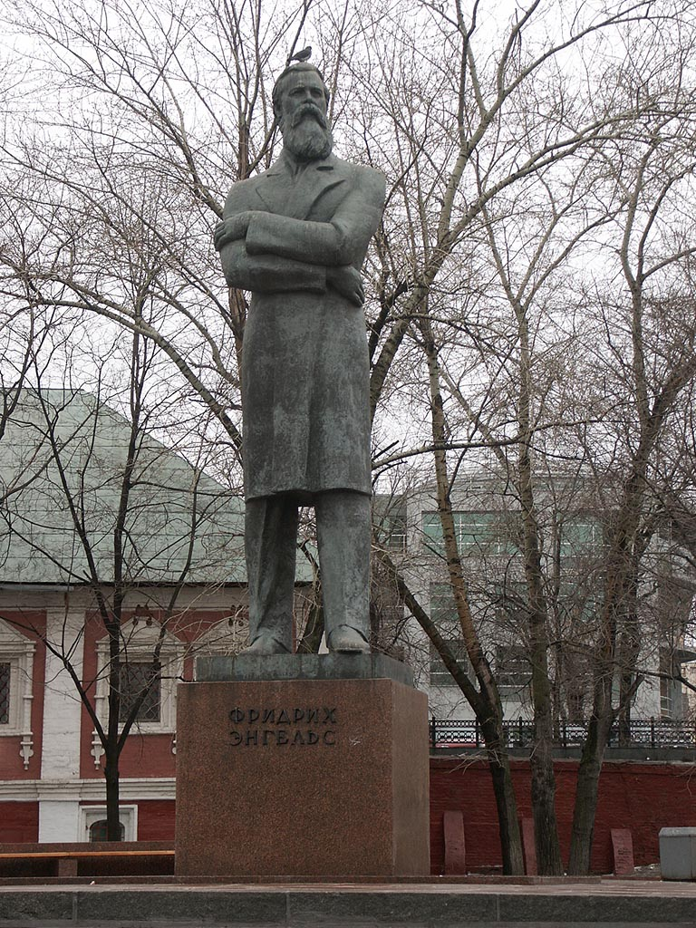 Россия: Москва: р-н Хамовники / Земляной город: пл.Предчистенские ворота: памятник Фридриху Энгельсу; 13:07 25.02.2008